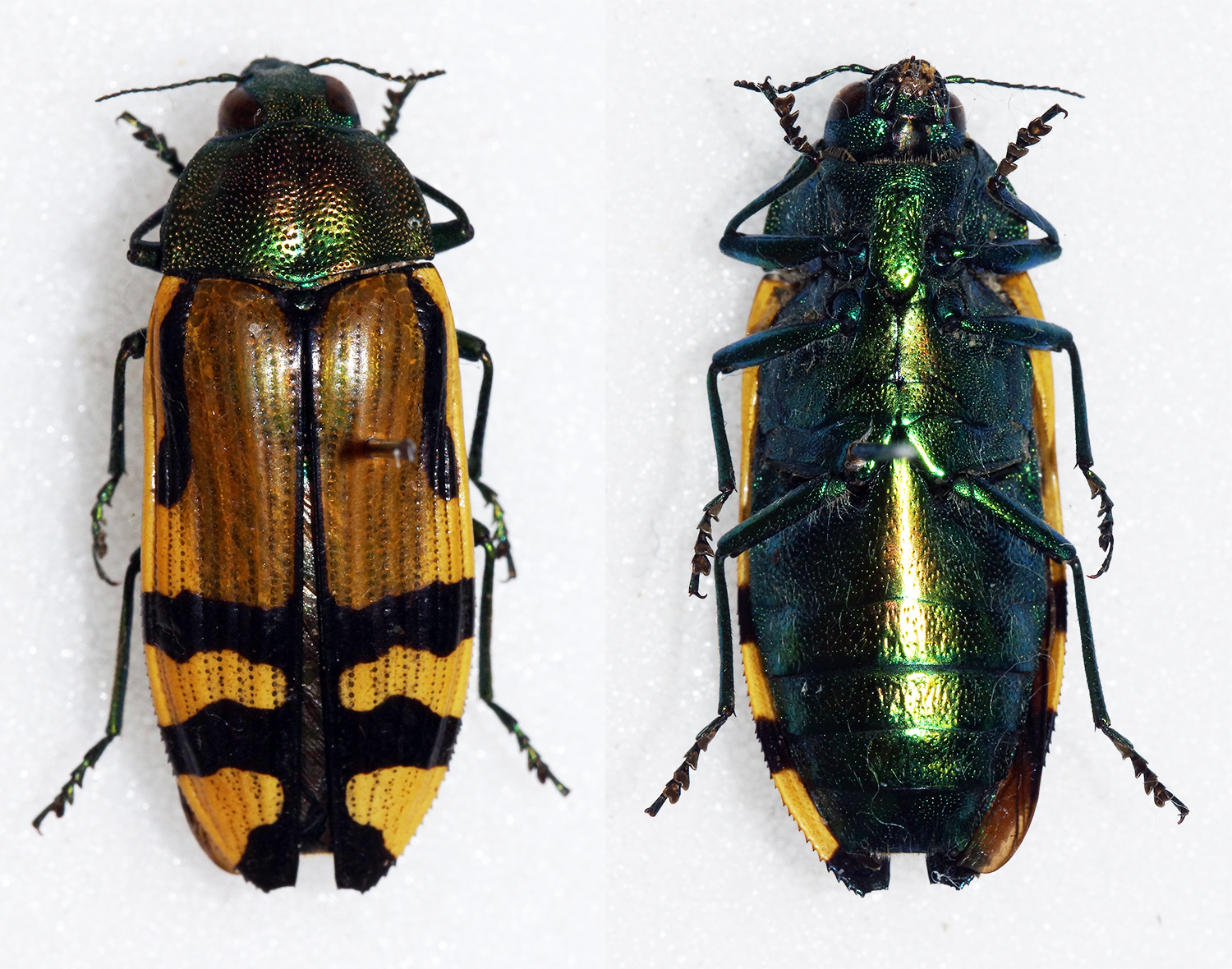 Fairmaire,1867 Sex: ? Data: 16-01-13 - Vilches - Maule - Chile Size: 22mm